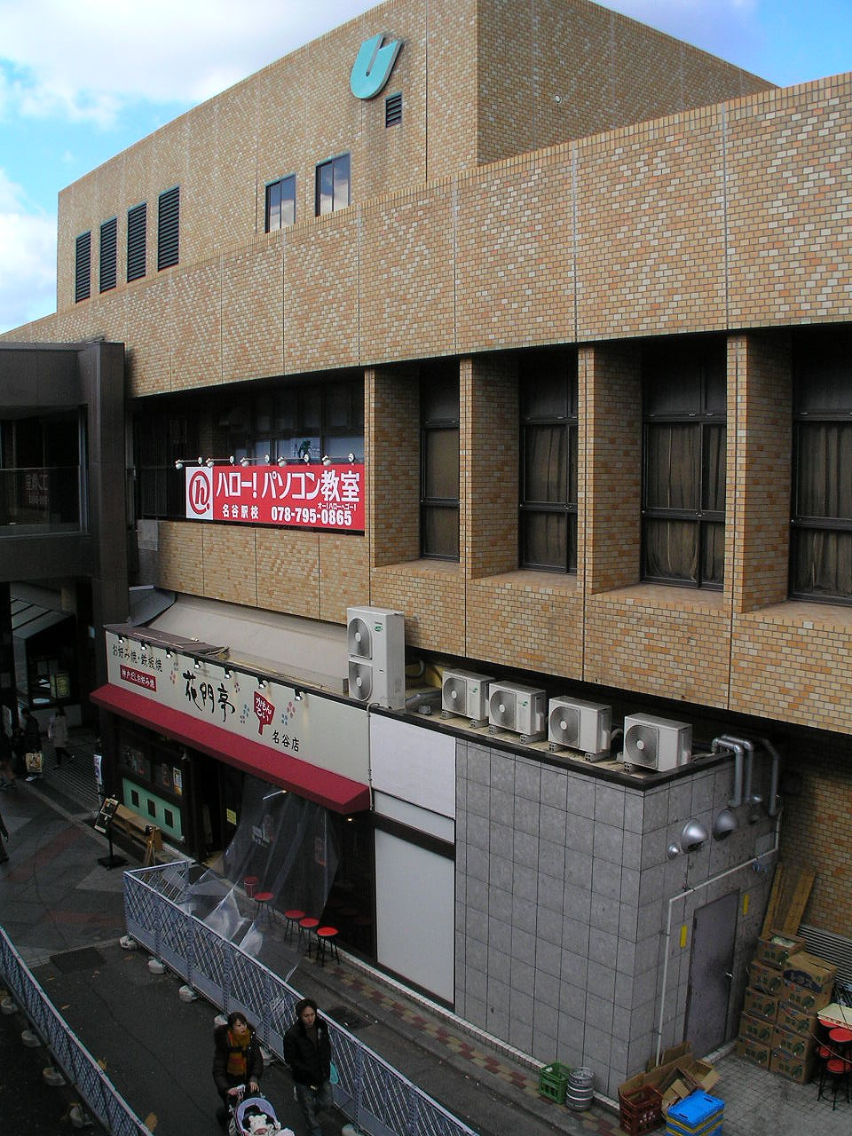 名谷駅ビル 神戸市営地下鉄西神・山手線